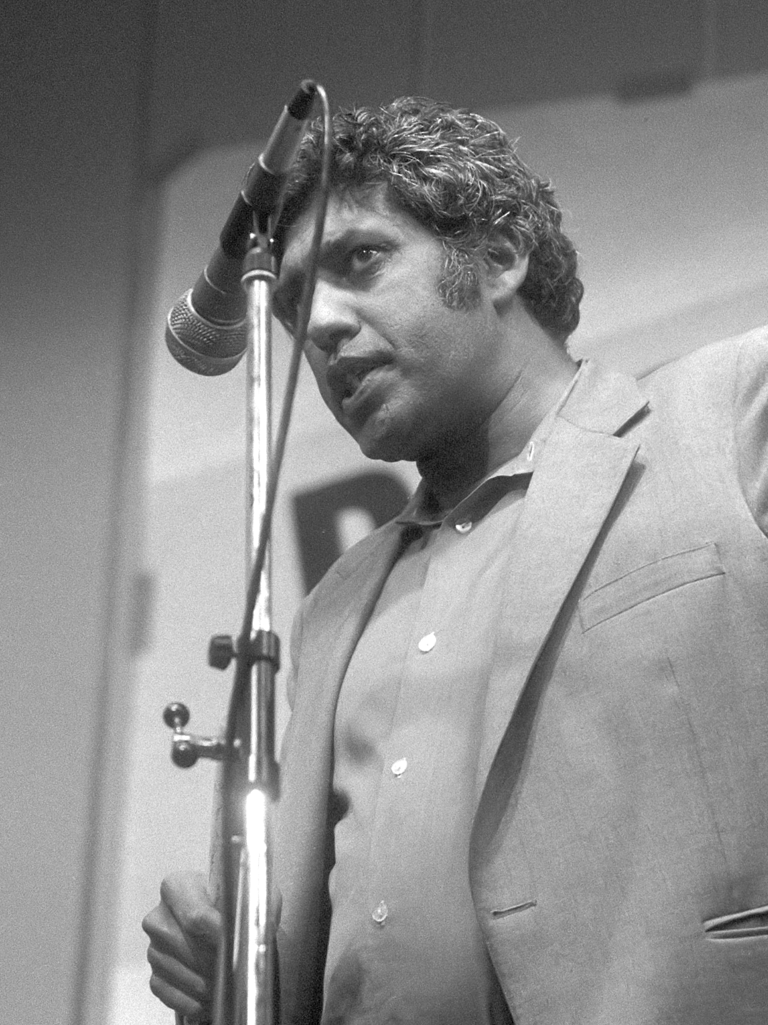 Protestbijeenkomst tegen noodtoestand in Zuid Afrika in Krasnapolsky; Essop Pahad spreekt namens ANC 22 augustus 1985